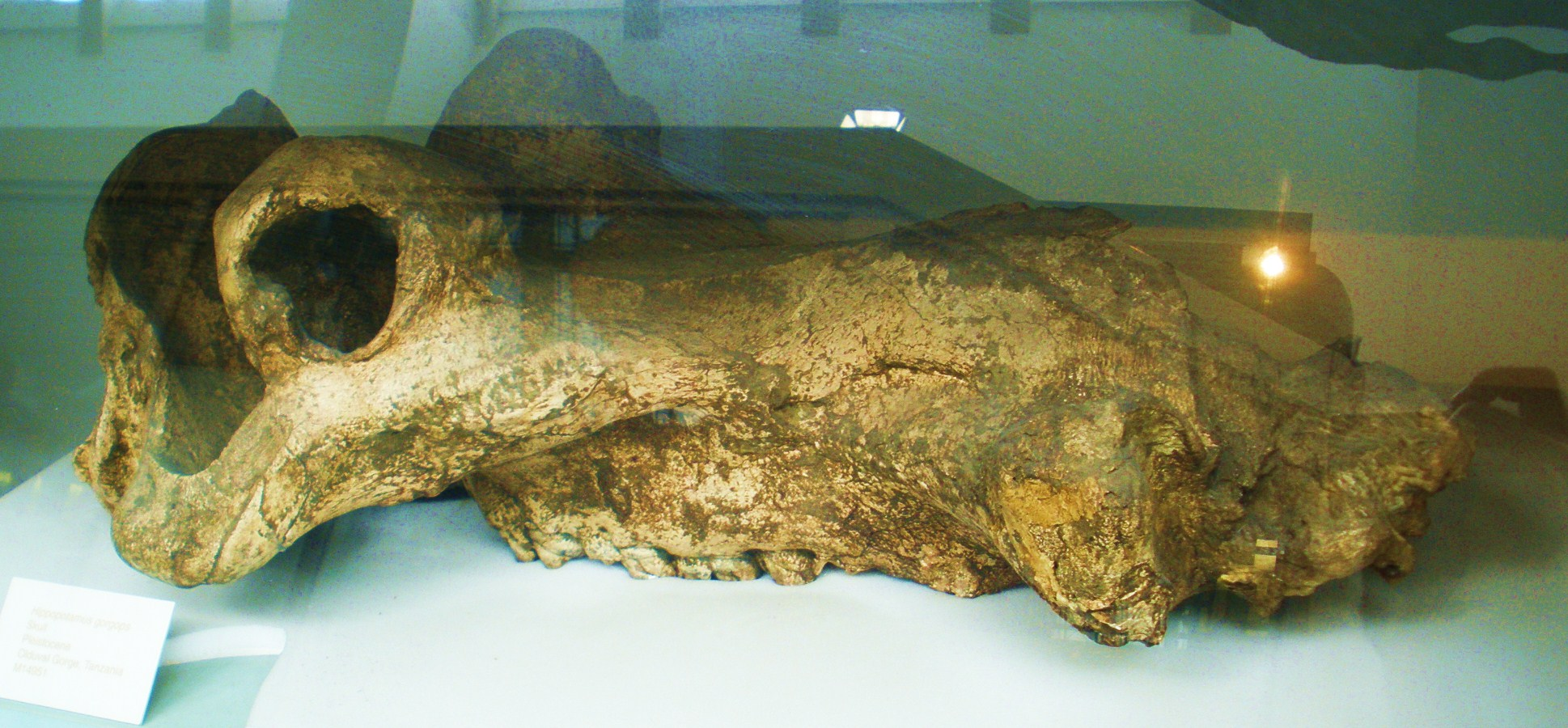 Fossil of Hipopotamus, an extinct mammal -- Took the photo at Natural History Museum, London